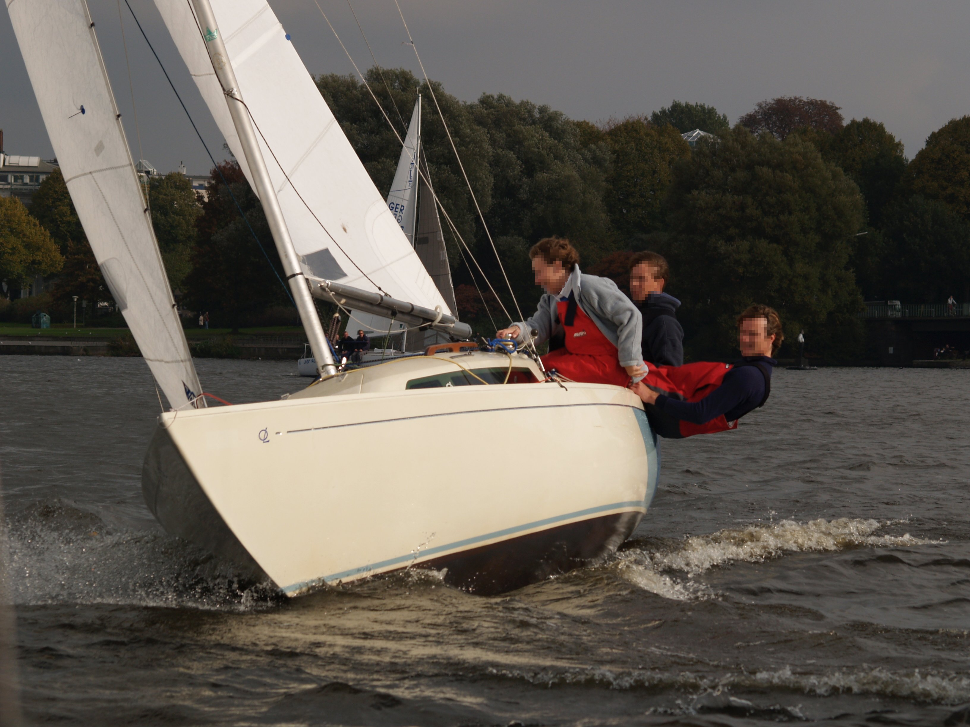 H-Boot